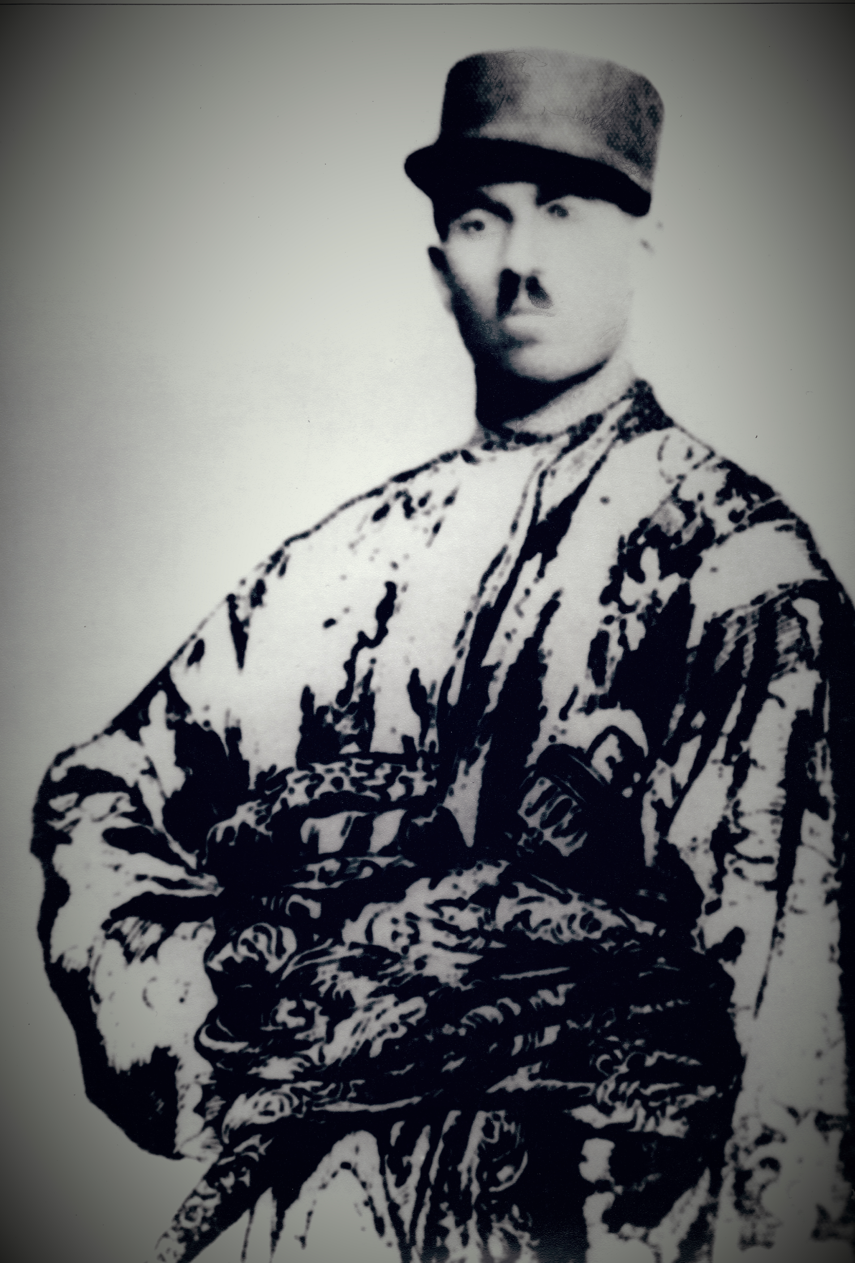 آقا نعمت الله علائی